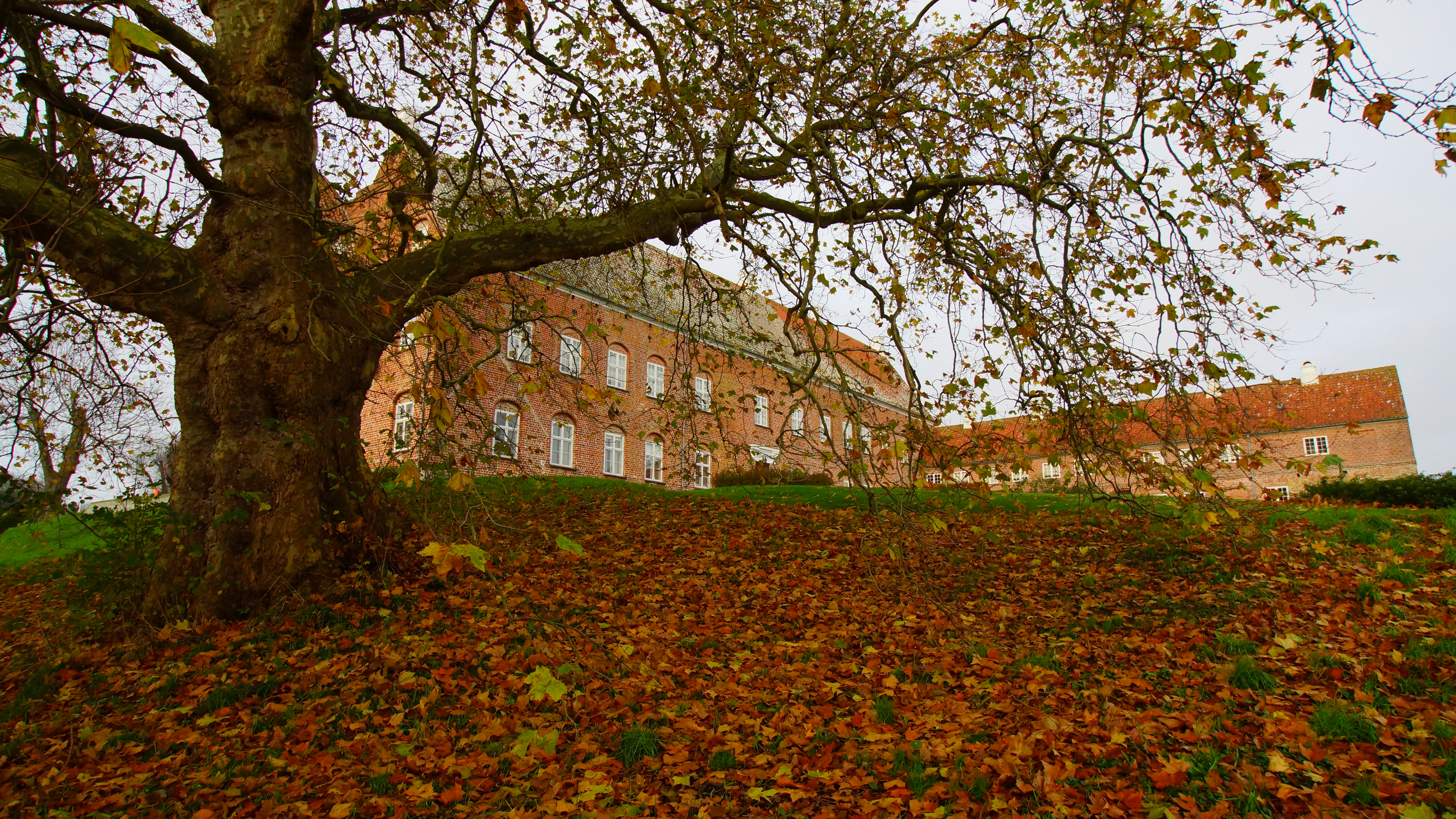 Rugård Slot 10.11.14, fra sydøst, 2